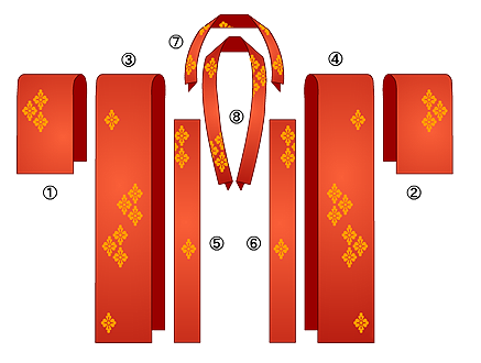 розкрієний сувій для пошиття кімоно